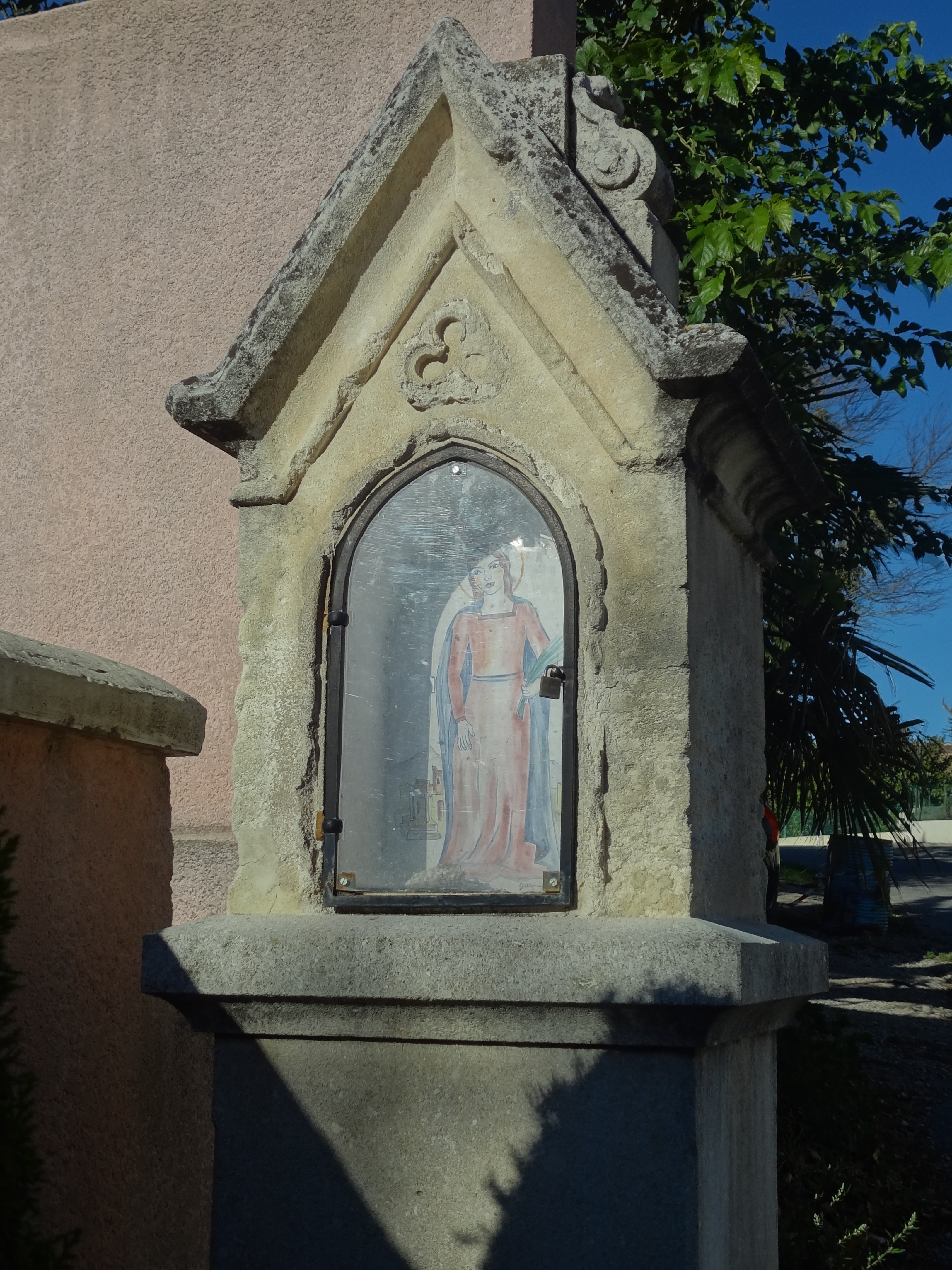 oratoire à La Brillanne, devant la mairie